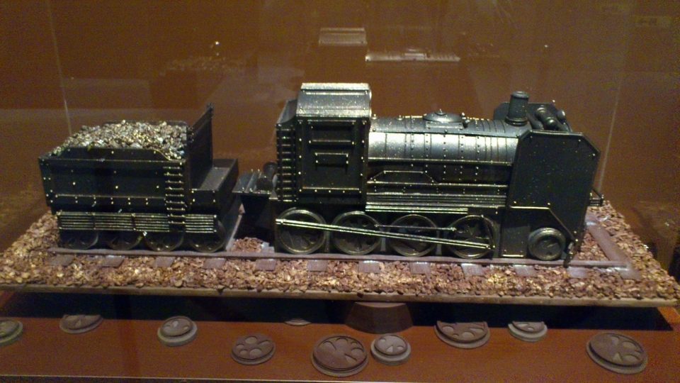 国立科学博物館、読売新聞社主催：特別展「チョコレート展」チョコレート製のD51形蒸気機関車 2012年11月16日撮影